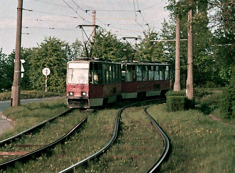 Tramwaj Konstal 105Na na rondzie Ronalda Reagana w Częstochowie.